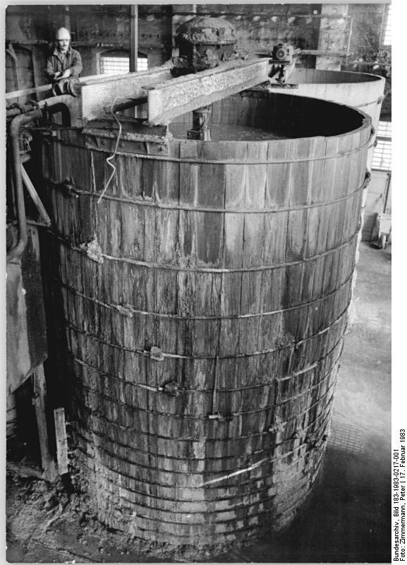 ADN-ZB-Zimmermann-17.2.83-eng-Berlin: Mehr als 15 Tonnen Eisenoxidgelb wurden im VEB Kali-Chemie, dem Stammbetrieb des Kombinats Lacke und Farben, seit Jahresbeginn zusätzlich produziert. In diesem riesigen, 30 Kubikmeter fassenden Rührbottich aus Eichenholz durchlaufen die Farben einen Herstellungsprozeß. Die Farbpigmente, auch unter der handelsüblichen Bezeichnung "Goldocker" bekannt, dienen u.a. zum Einfärben von Fußbodenbelag, Leder, Gummi und Beton. - siehe auch 1983-0217-2 und 21 N -"